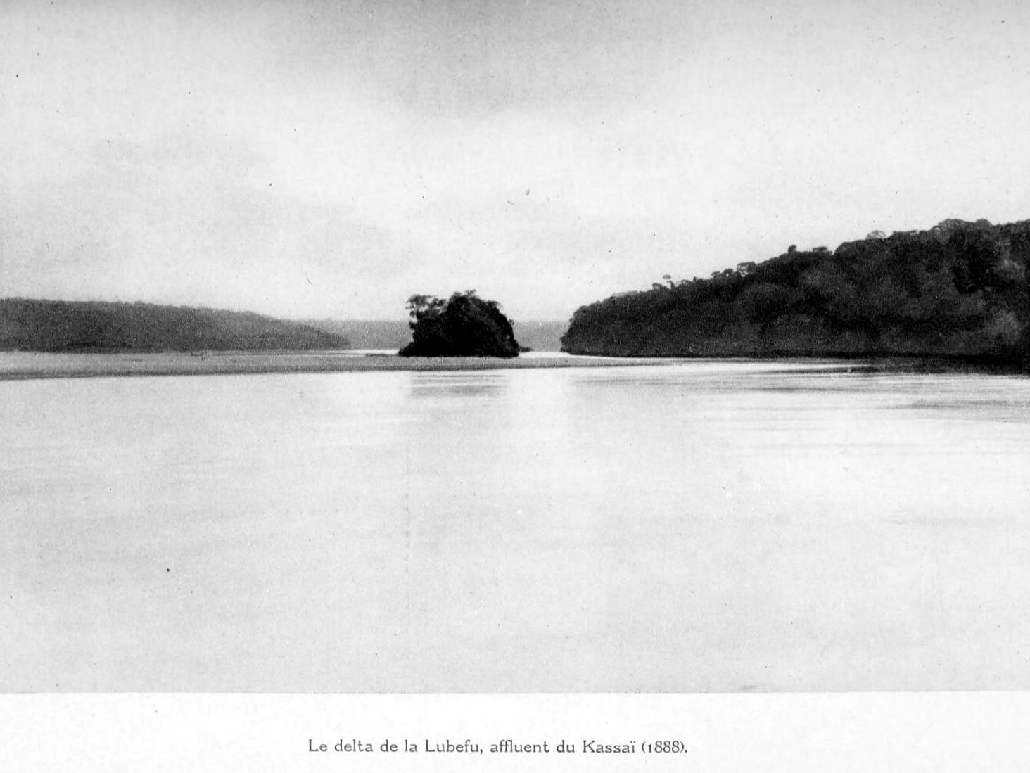 Le delta de la Lubefu, affluent du Kassaï (1888) - p. 266